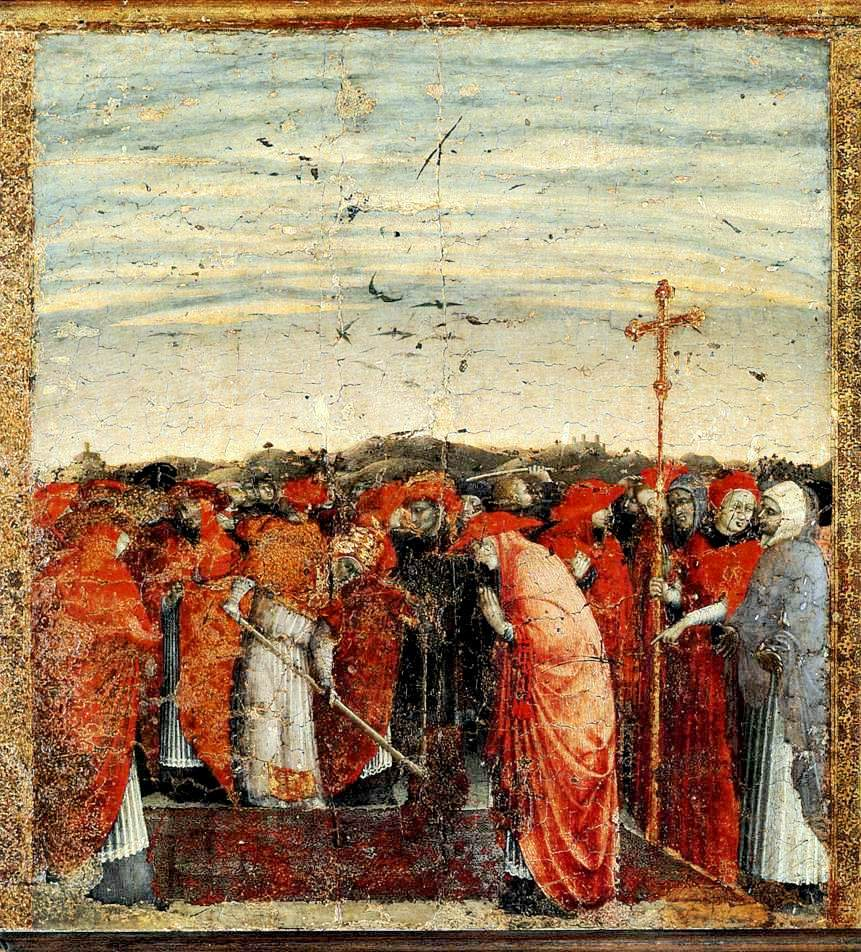 predella